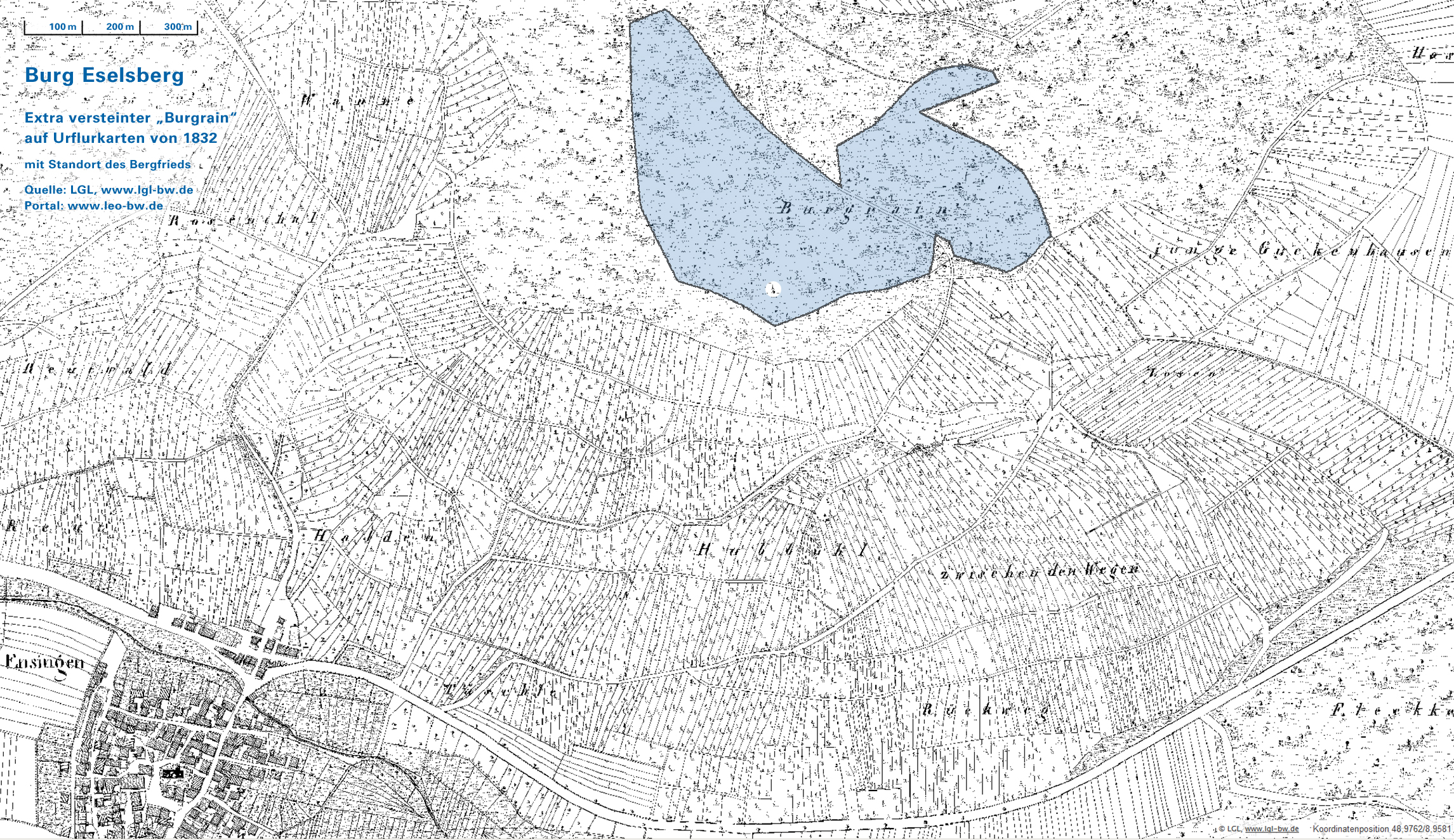 Burgrain auf dem Eselsberg bei Ensingen: Mit 50 Grenzsteinen ausgemarktes Areal der Burg Eselsberg (blau unterlegt) mit keilförmigen Einschnitten im Bereich der Zugangswege und weiß ausgespartem Standort des ehemaligen Bergfrieds. Größte West-Ost-Ausdehnung: 684 m; größte Nord-Süd-Ausdehnung: 527 m Vorlage: Flurkarten-Composit auf hinterlegbar mit topographischer Karte, Luftbild u.a.